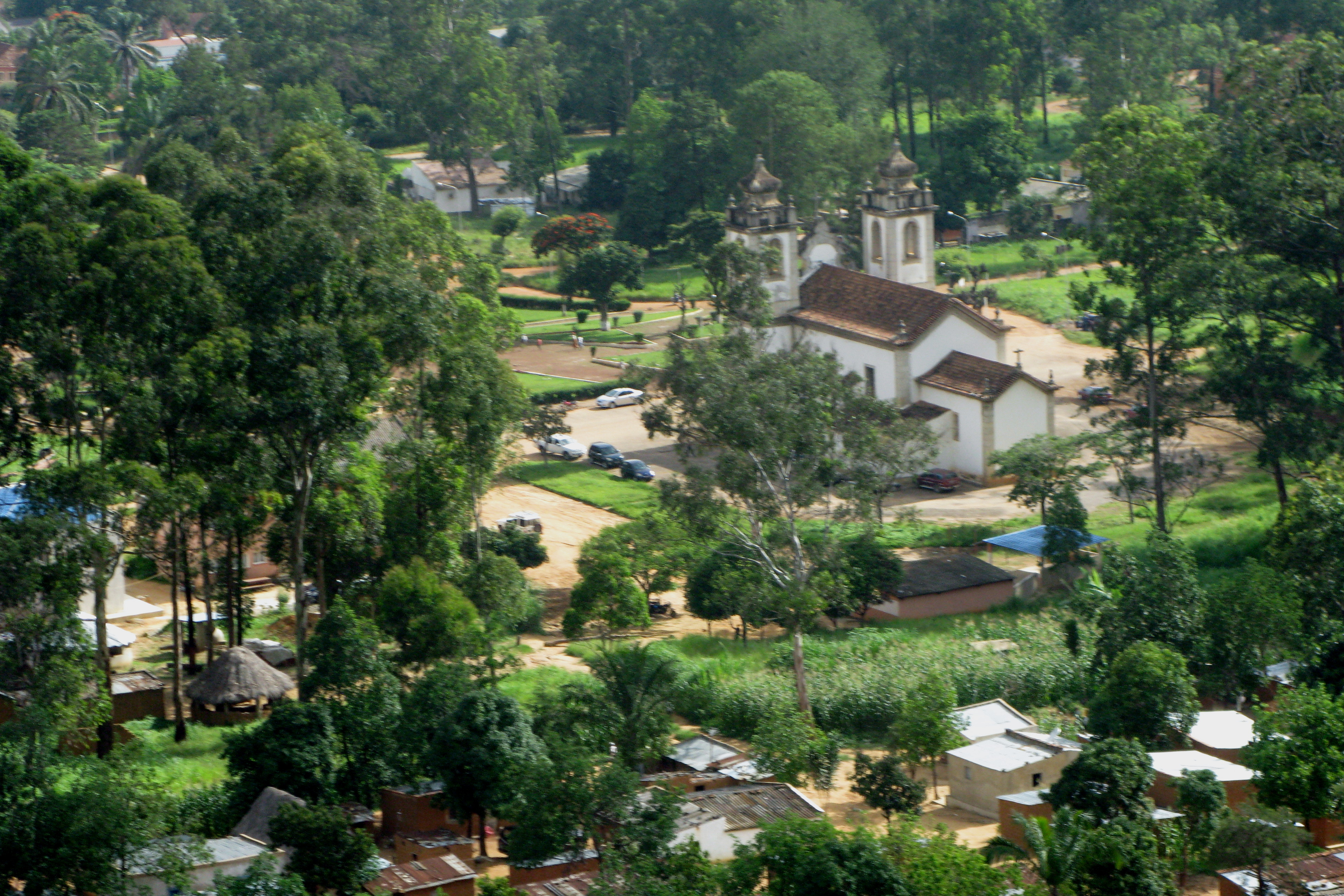 Waku Kungo